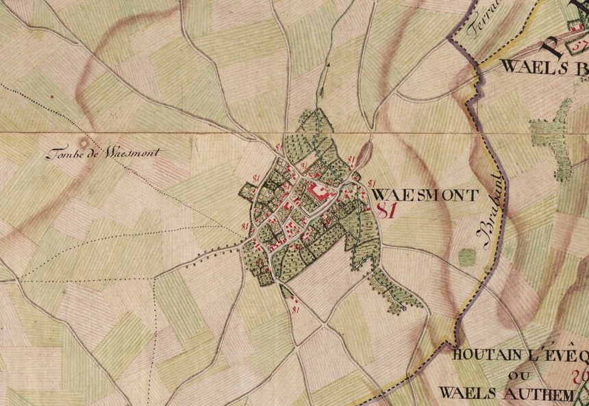 Extrait de la carte de Ferraris n° 133Bc